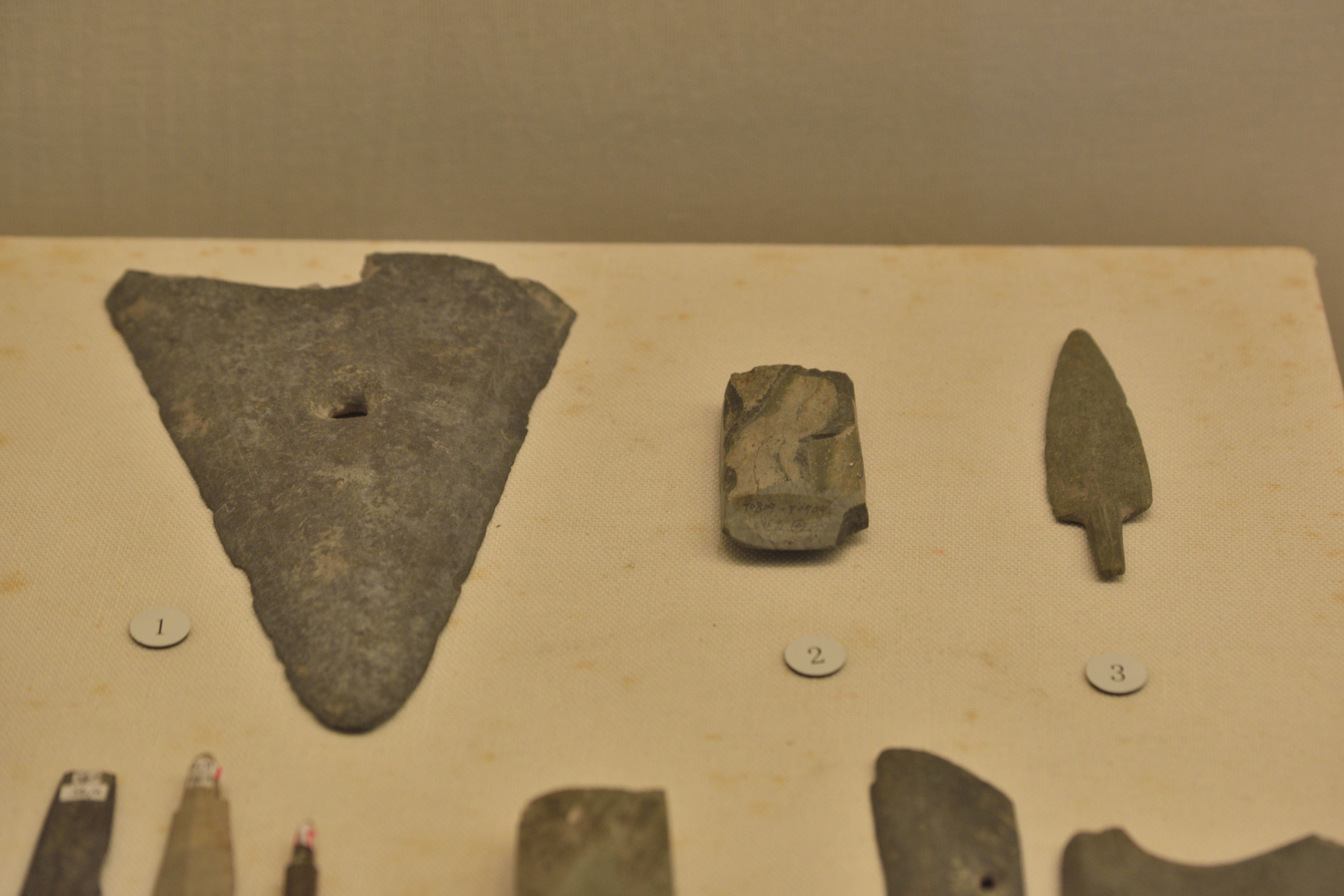 塔山遗址出土破土器及石锛(右二)